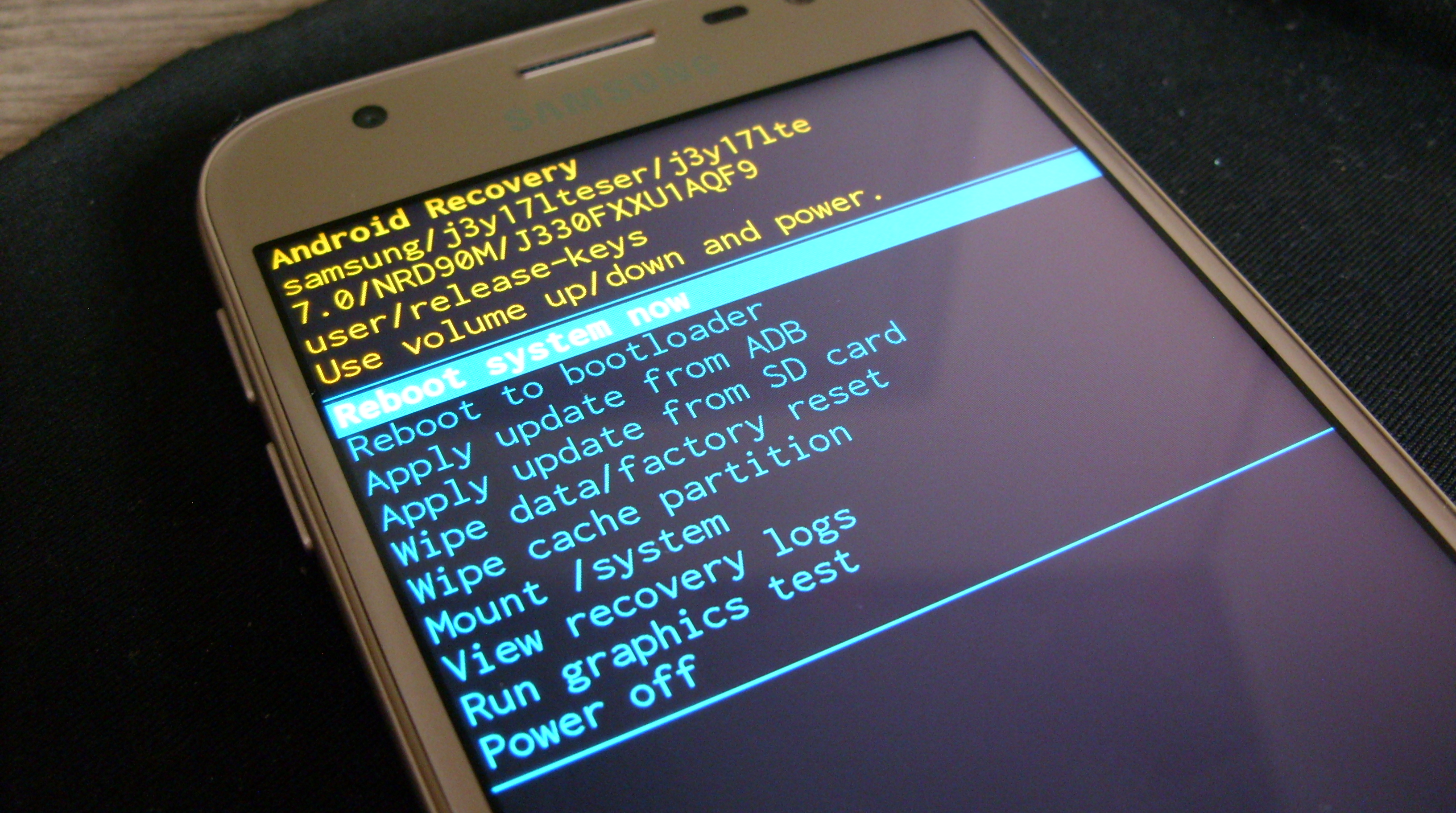 Tryb recovery w systemie Android